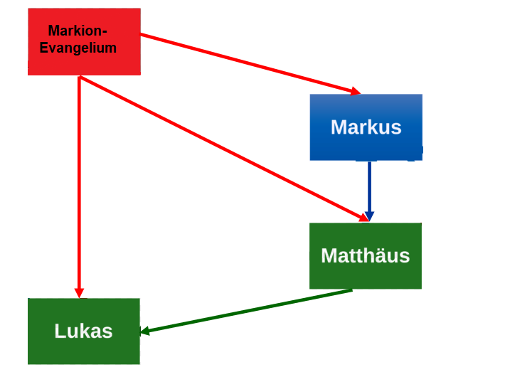 Darstellung der Beziehungen des rekonstruierten Markion-Evangeliums und den Synoptikern nach Matthias Klinghardt (2015). siehe hierzu auch Matthias Klinghardt: Das älteste Evangelium und die Entstehung der kanonischen Evangelien. Untersuchung – Rekonstruktion – Übersetzung – Varianten. 2 Bände. Francke, Tübingen 2015, ISBN 978-3-7720-8549-9, S.191.